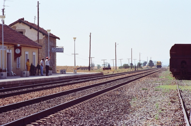 Jefe del Gabinete de Circulación presentando la señal de tren directo a un convoy que se aproxima a la estación de Puerto Escandón (Teruel) procedente de Valencia. Circa 1988